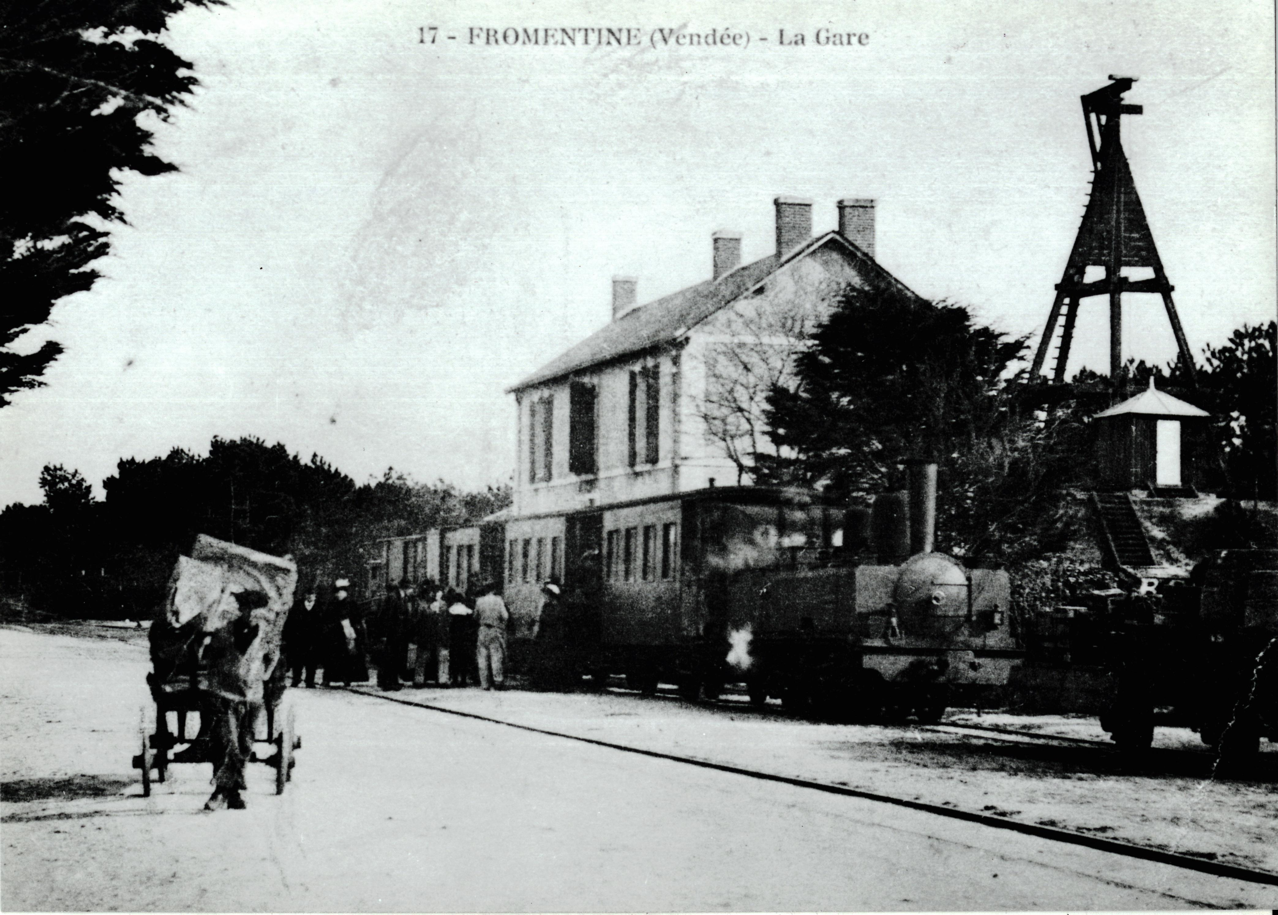 Gare de Fromentine début XXème